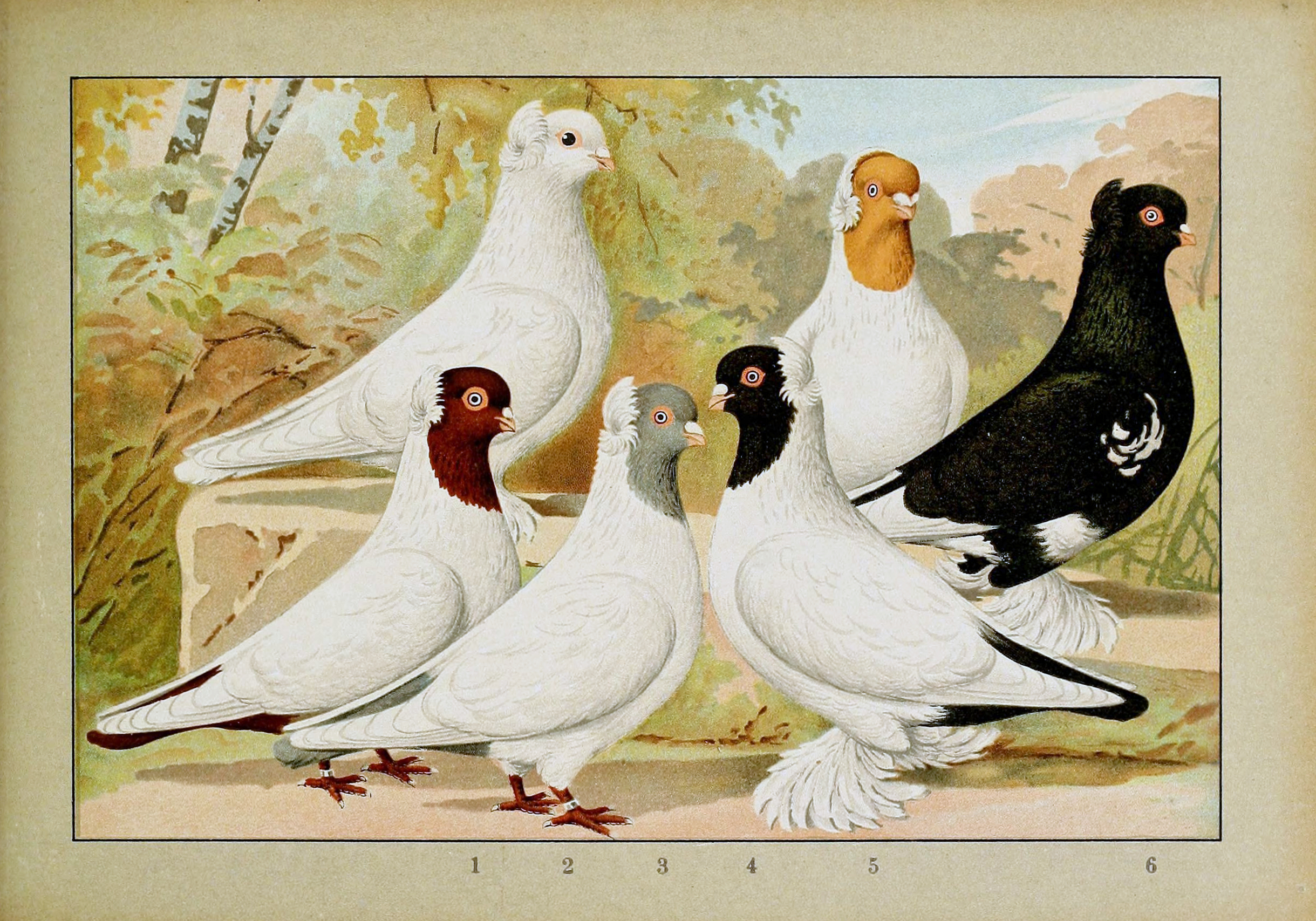 Deutsch